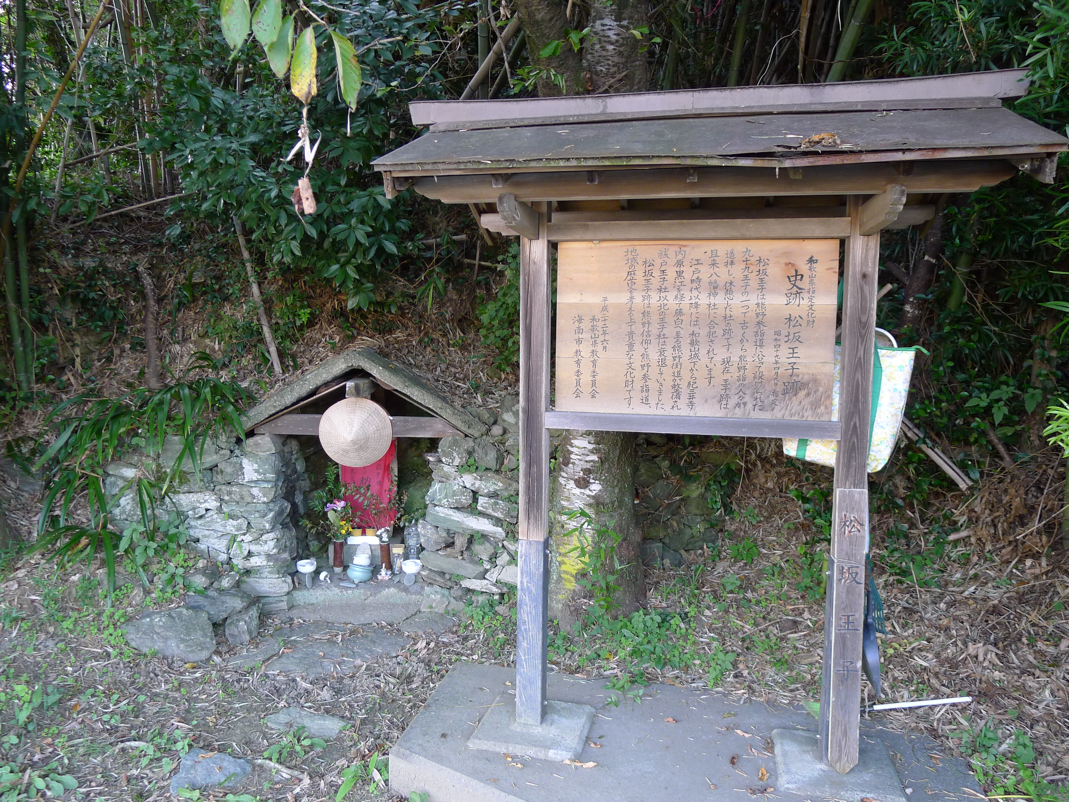 熊野古道・紀伊路の九十九王子の一つ松坂王子（和歌山県海南市）